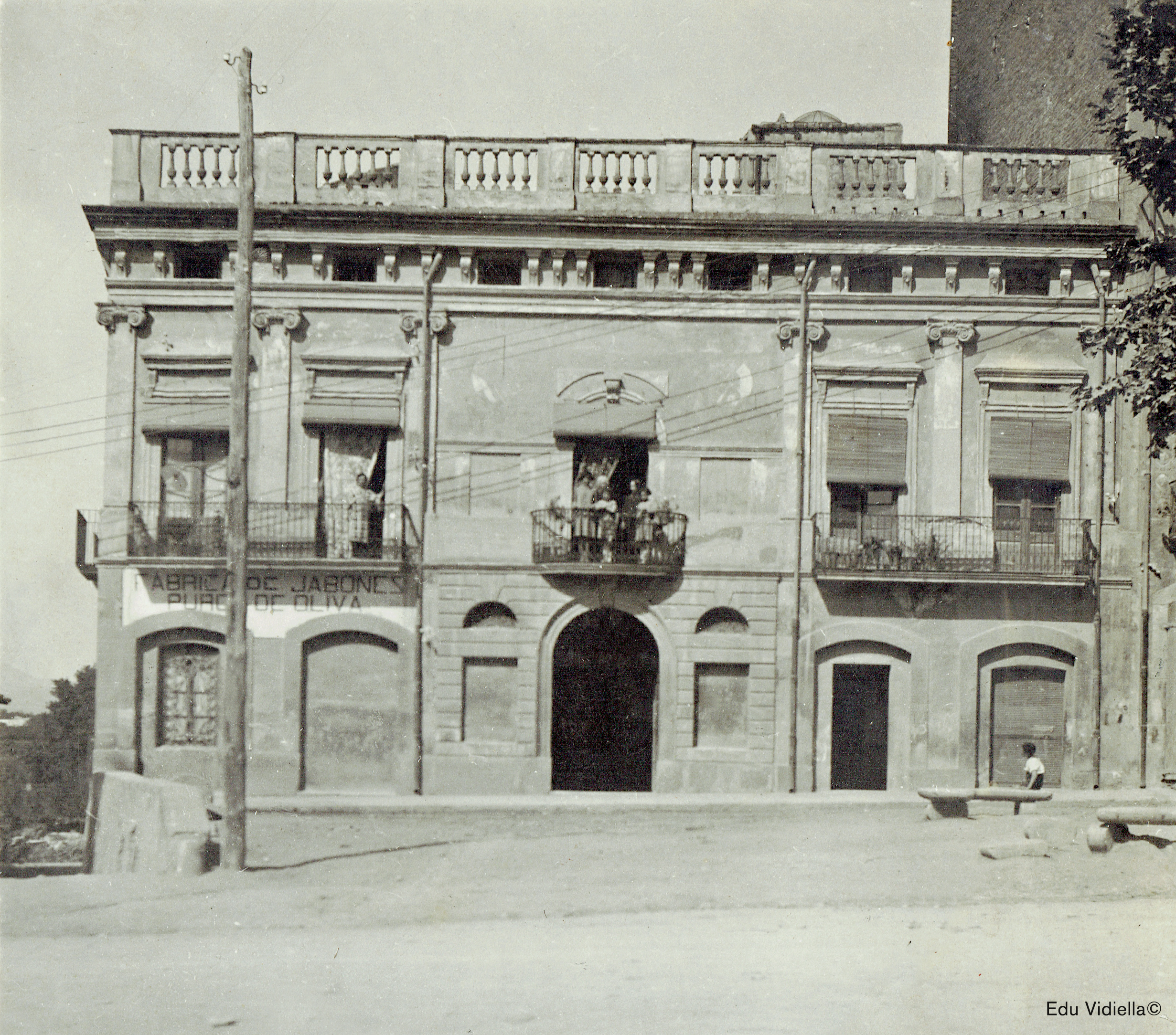 Detall de la façana de «Cal Coco» (1900 ca.) on es llegeix: «FABRICA DE JABONES PUROS DE OLIVA»